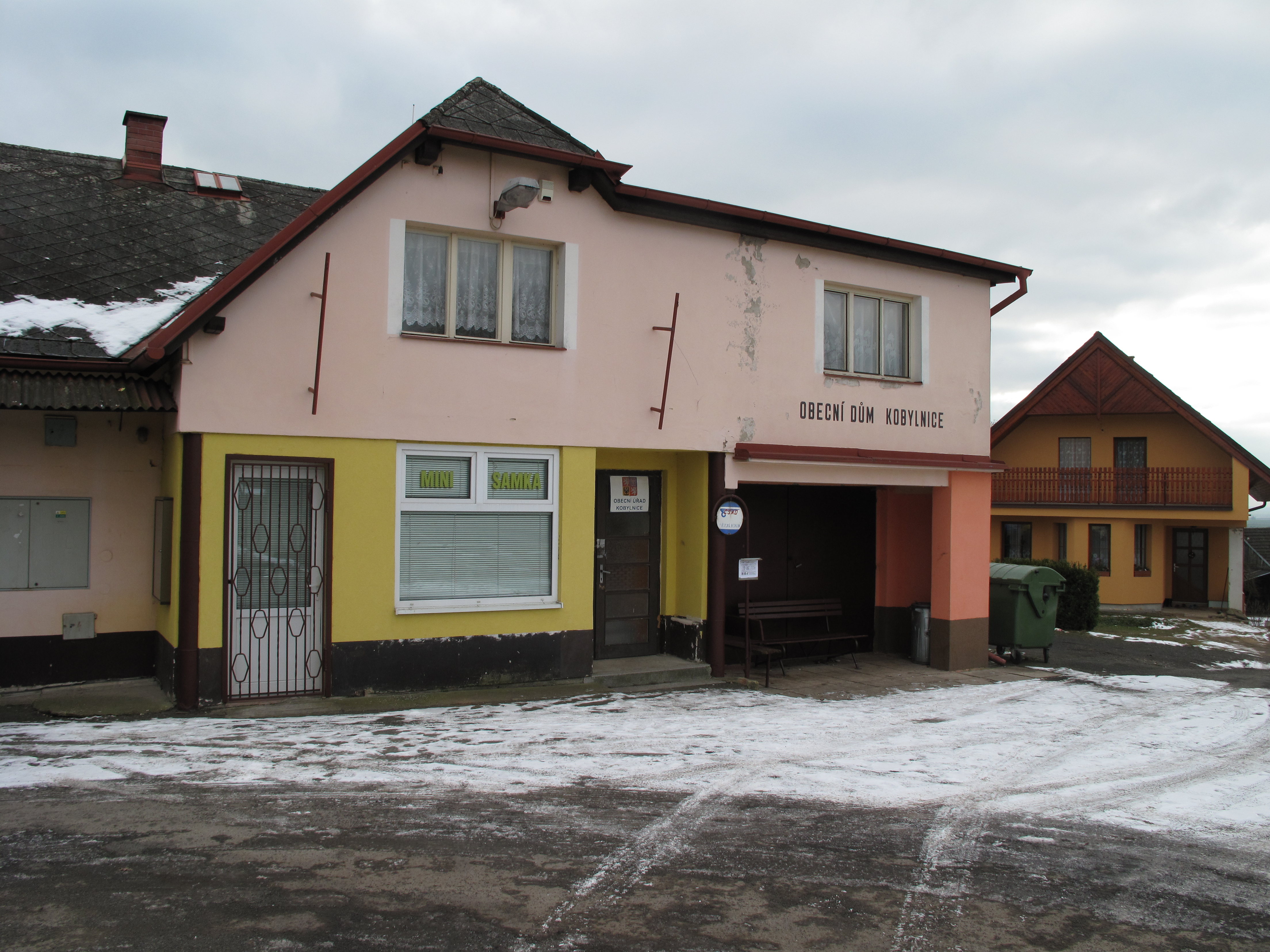 Úřad v Kobylnici. Okres Mladá Boleslav, Česká republika.